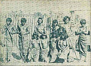 Indios Bildunterschrift: "Sanibelli y Degiorgio, Santiago y Punta Arenas" (span. für: Sanibelli und Degiorgio, Santiago und Punto Arenas) und "Recuerdo del Estrecho de Magellanes" (span. für: Gruß von der Magellanstraße) Schwarzweißlithographie; Abbildung von einer nach Österreich adressierten Postkarte; handschriftlich datiert vom 3. September in Punta Arenas, rückseitiger Poststempel aus Punta Arenas vom 4. September 1900